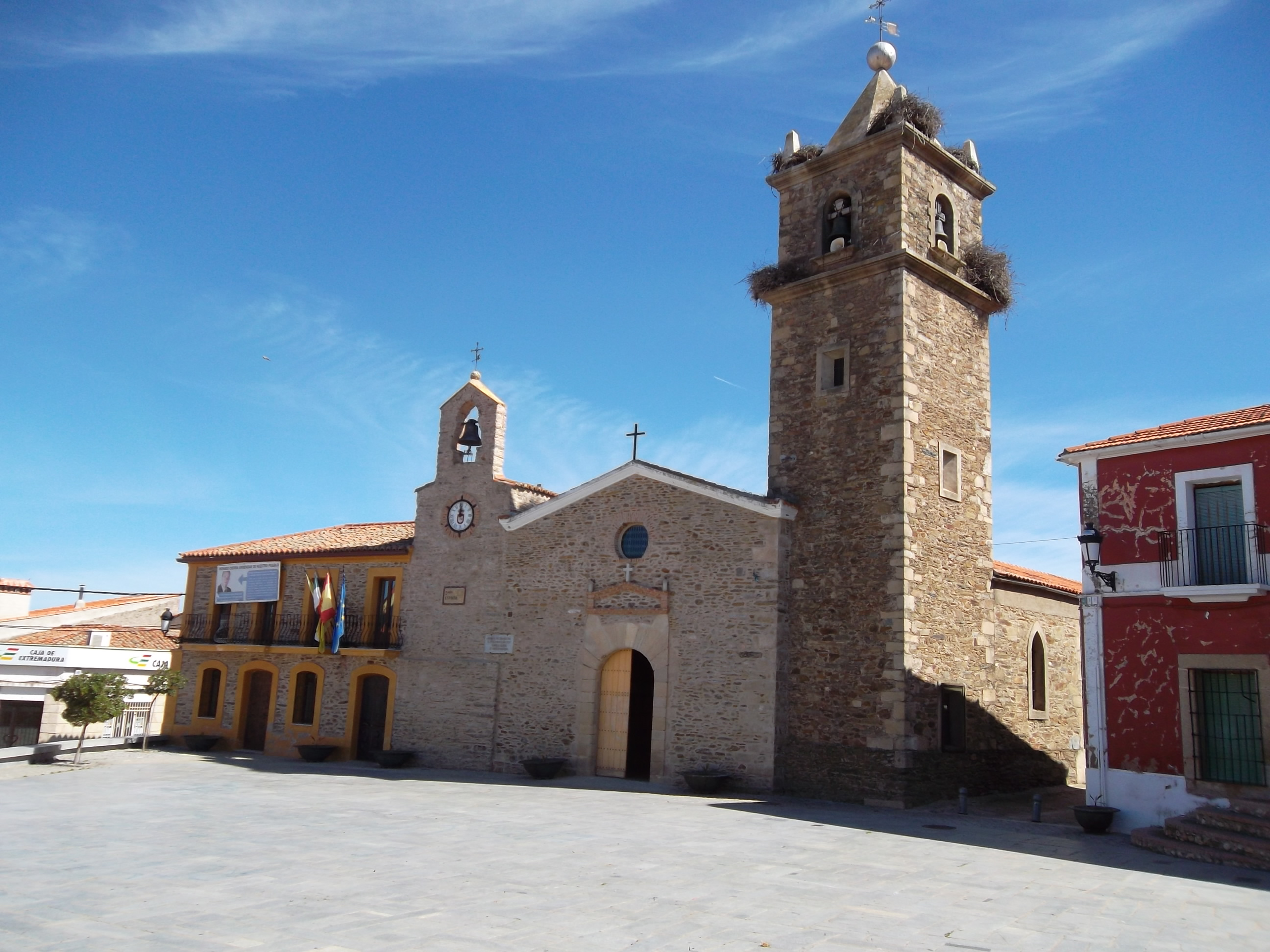 La Plaza de España de Aldeacentenera un pueblecito de la provincia de Cáceres en Extremadura, España.